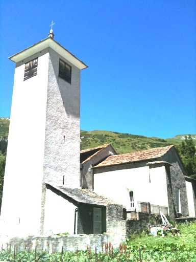 reformierte Kirche Hinterrhein, Kanton Graubünden